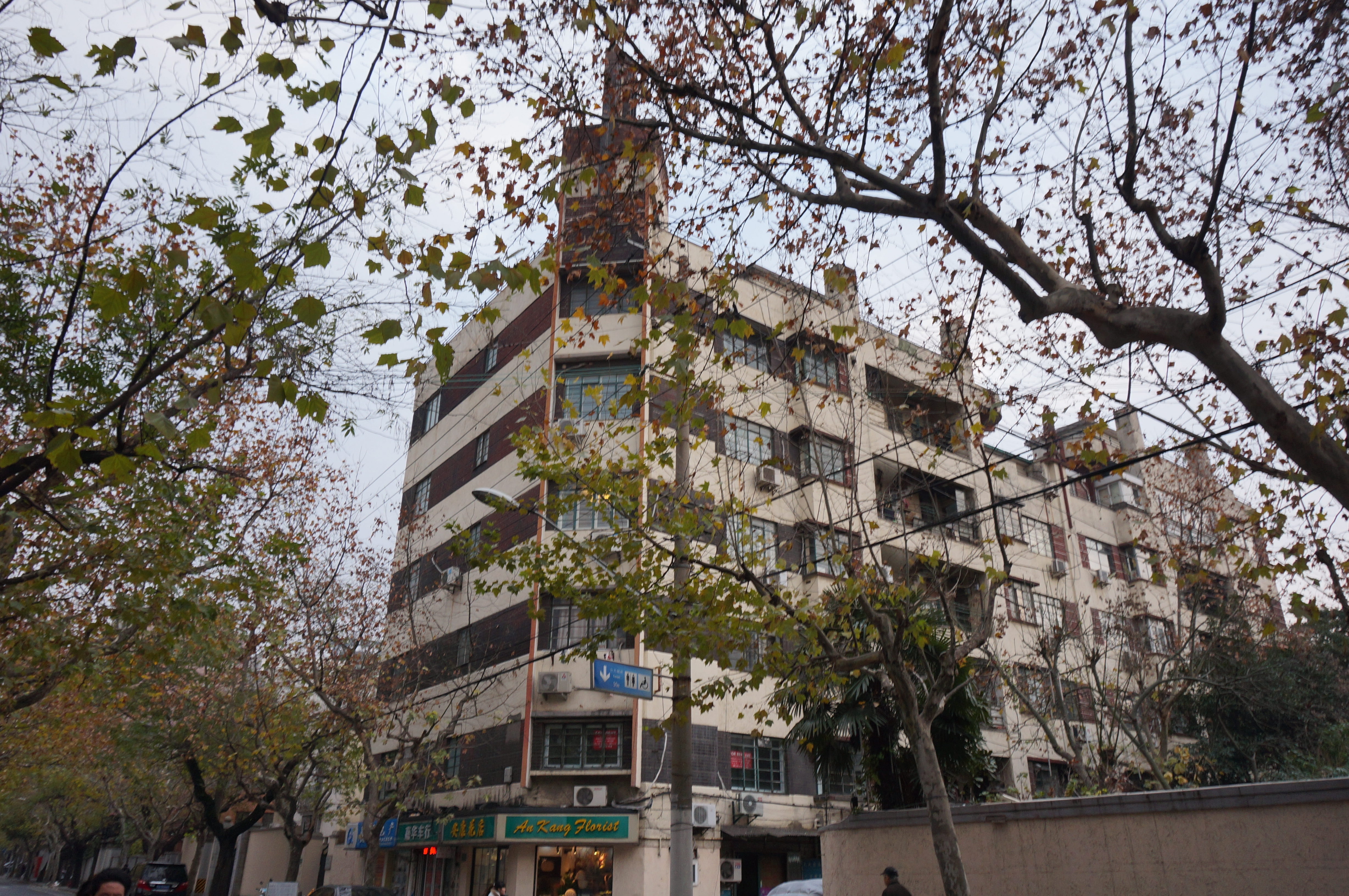 安康公寓（巨福公寓）